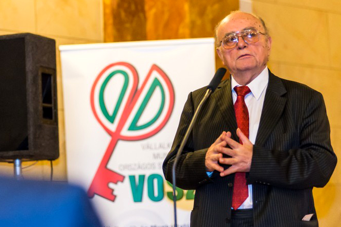 Demján Sándor, a Vállalkozók és Munkáltatók Országos Szövetségének elnöke a 2014. évi Veszprém Megyei Prima Díj átadóján